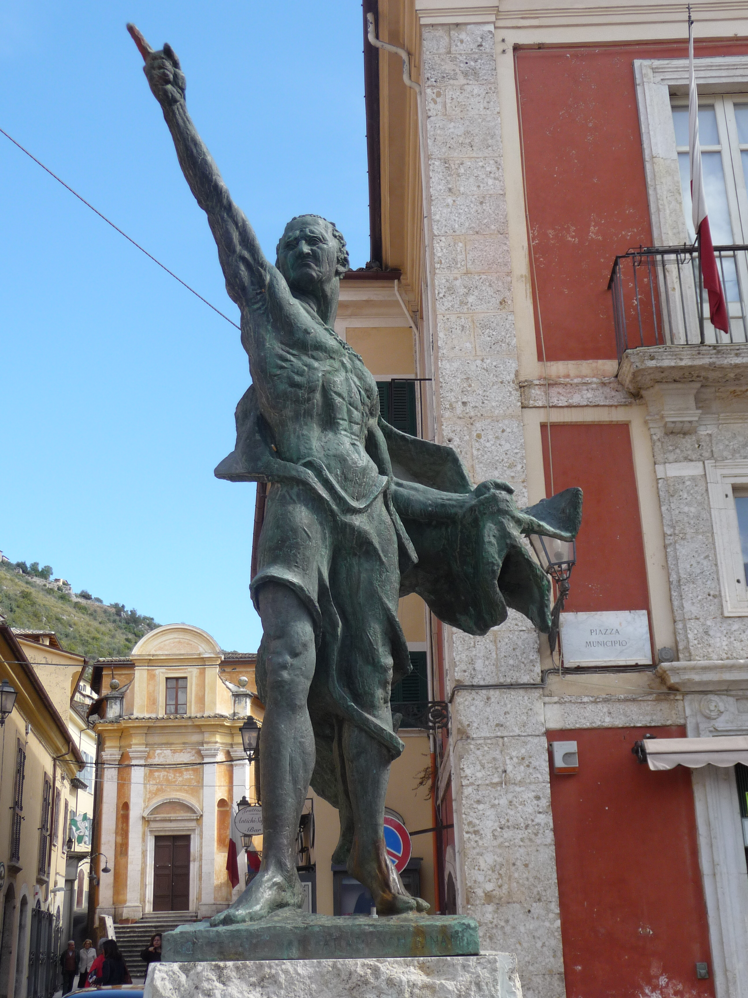 Marco Tullio Cicerone